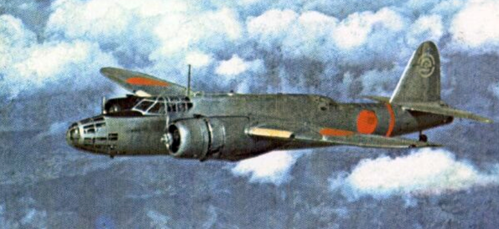 Ki-49 in Hamamatsu Army Heavy Bomber School